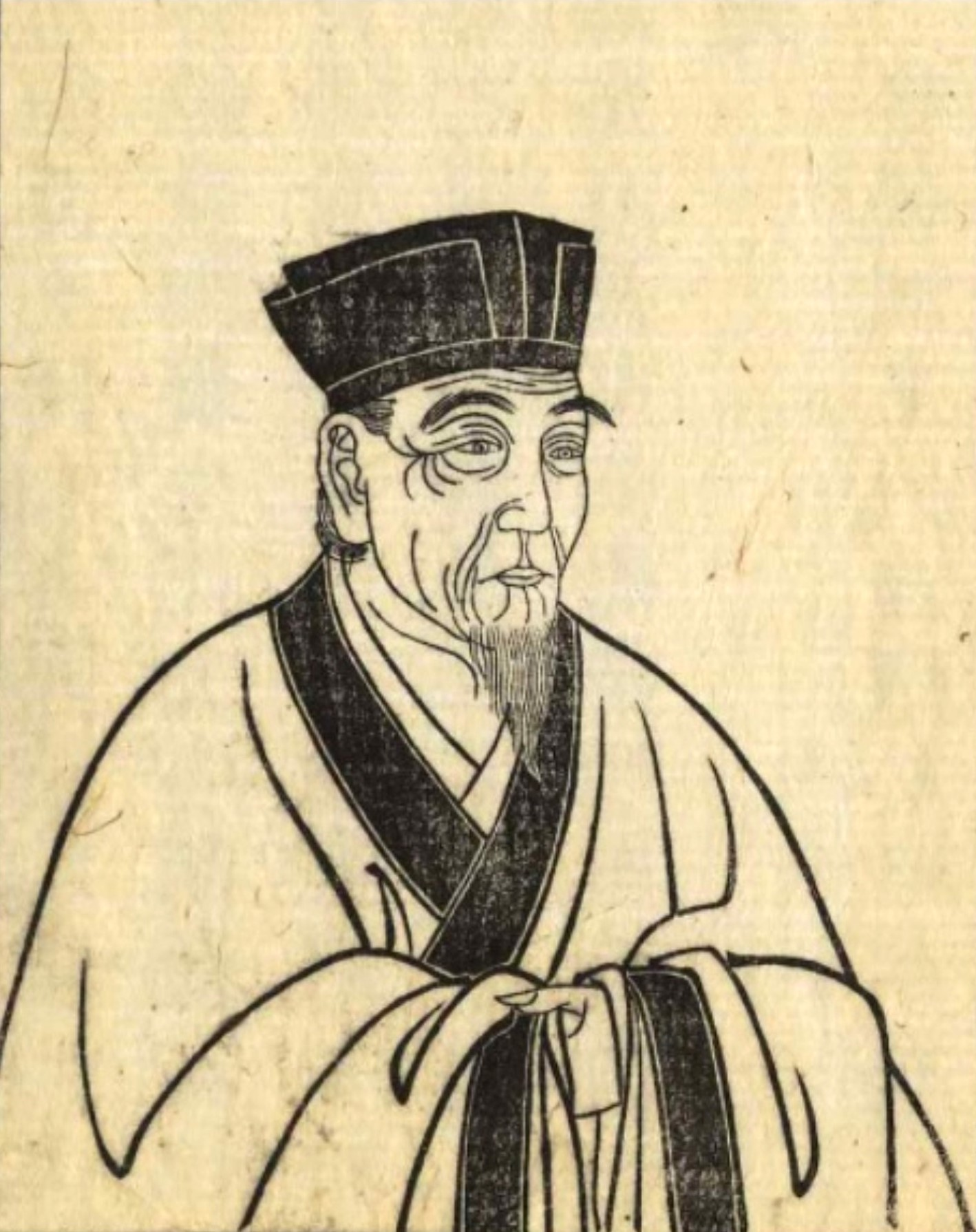 Kinoshita, abgedruckt in seiner Schriftensammlung